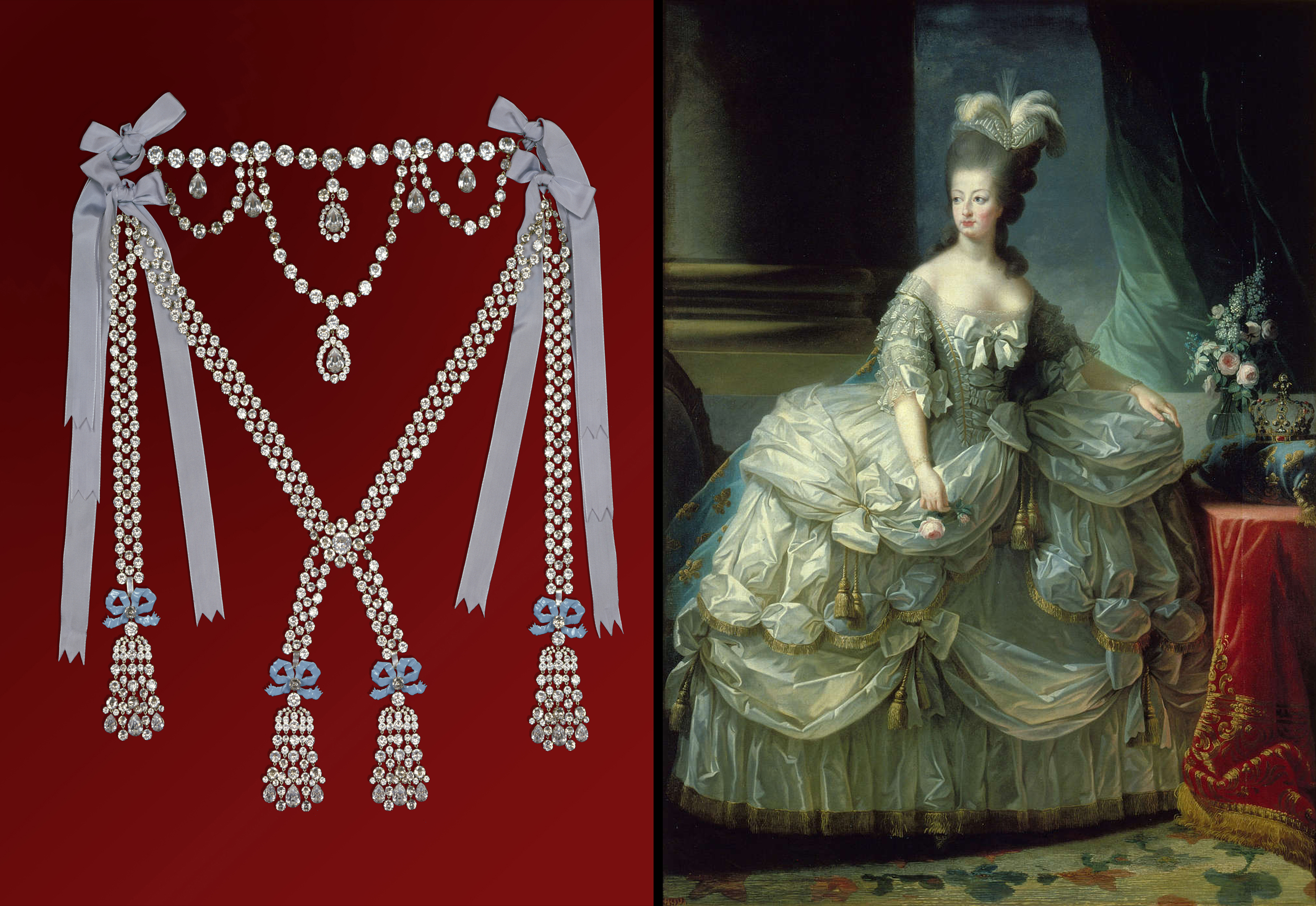 Collier de la Reine cabinet des trésors Château de Breteuil Marie Antoinette